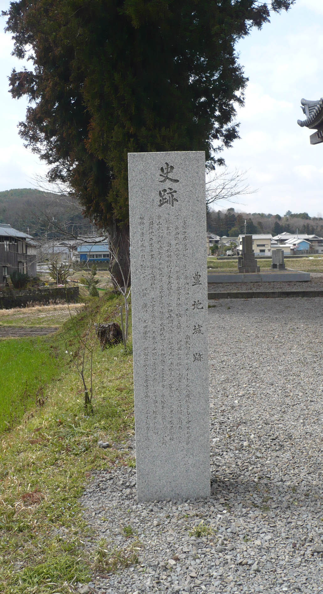 豊地城の石碑